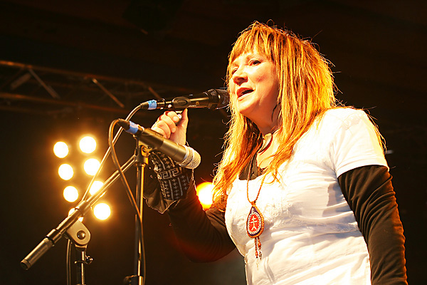 Mari Boine opptrer på Riddu Riddu-festivalen 2006